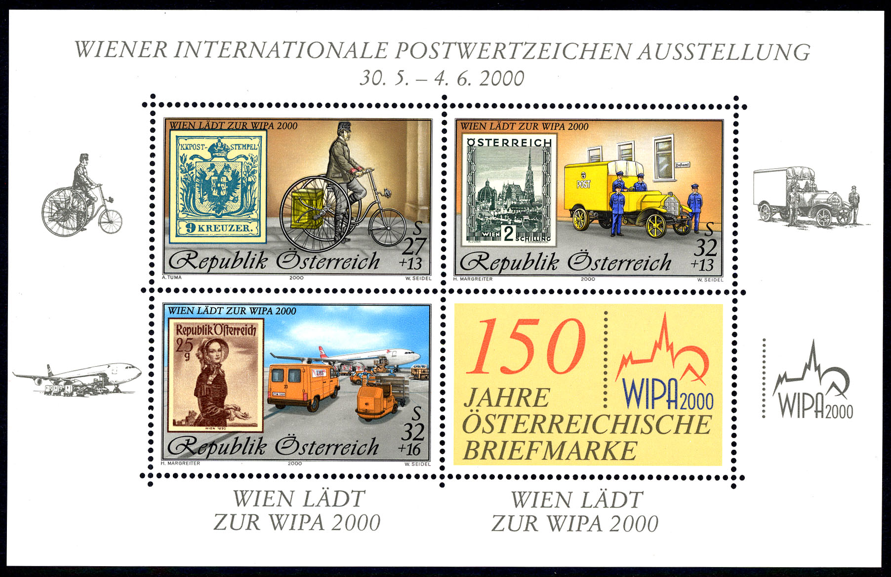 Sondermarkenblock "Wien lädt zur WIPA 2000"